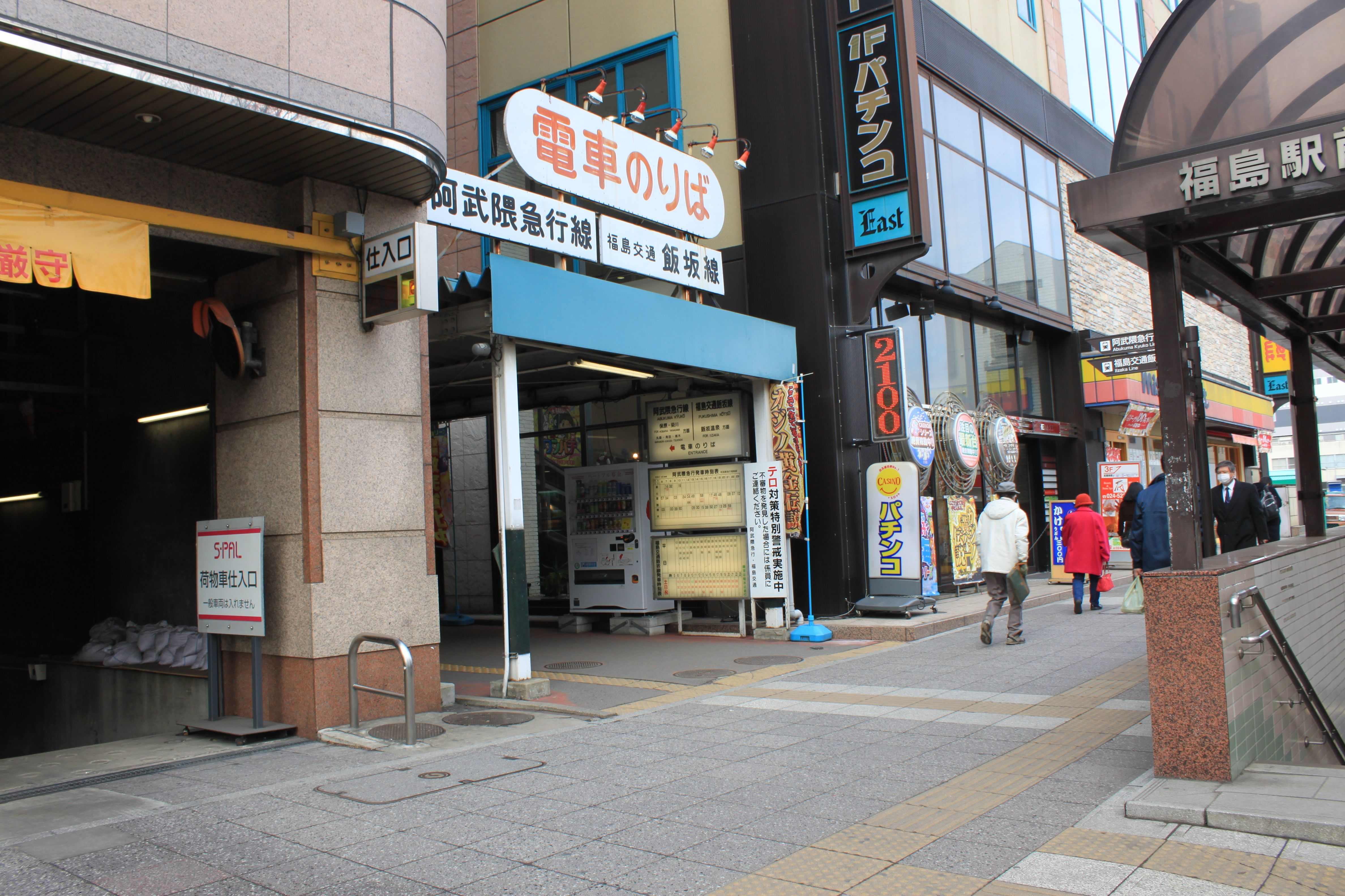 福島駅